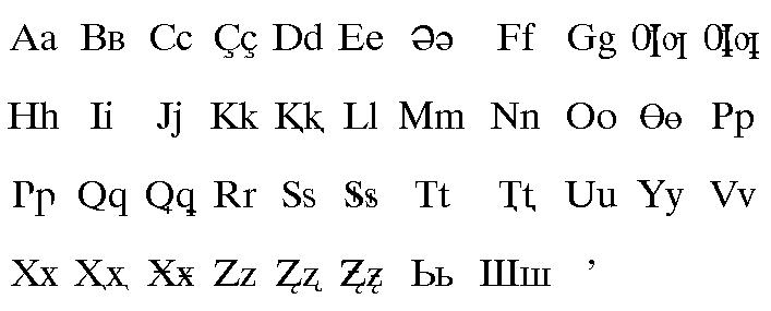 Цахурский алфавит 1934-1938 годов